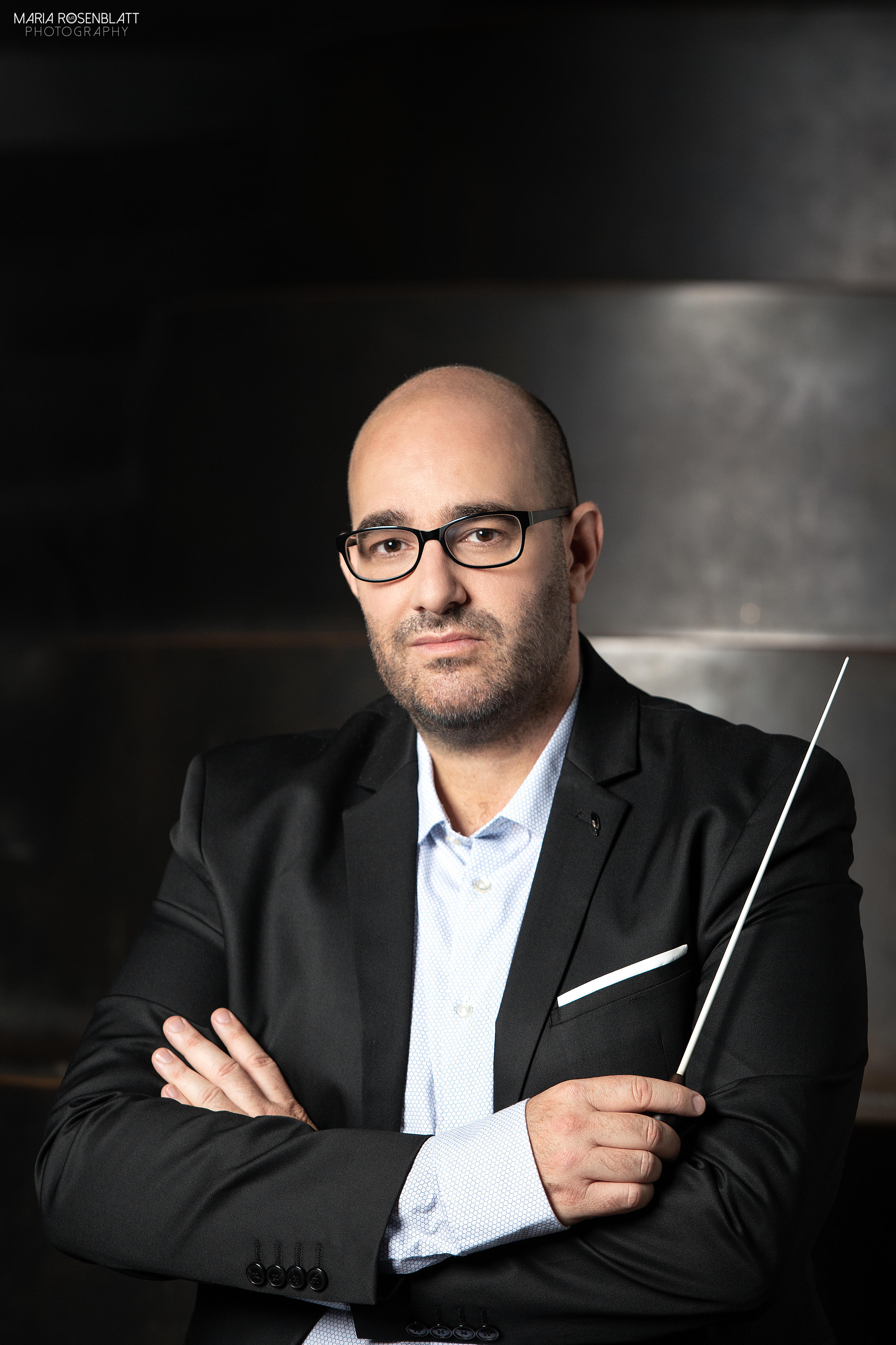 צילום שנמסר אלי ממר ישי שטקלר לבקשתי